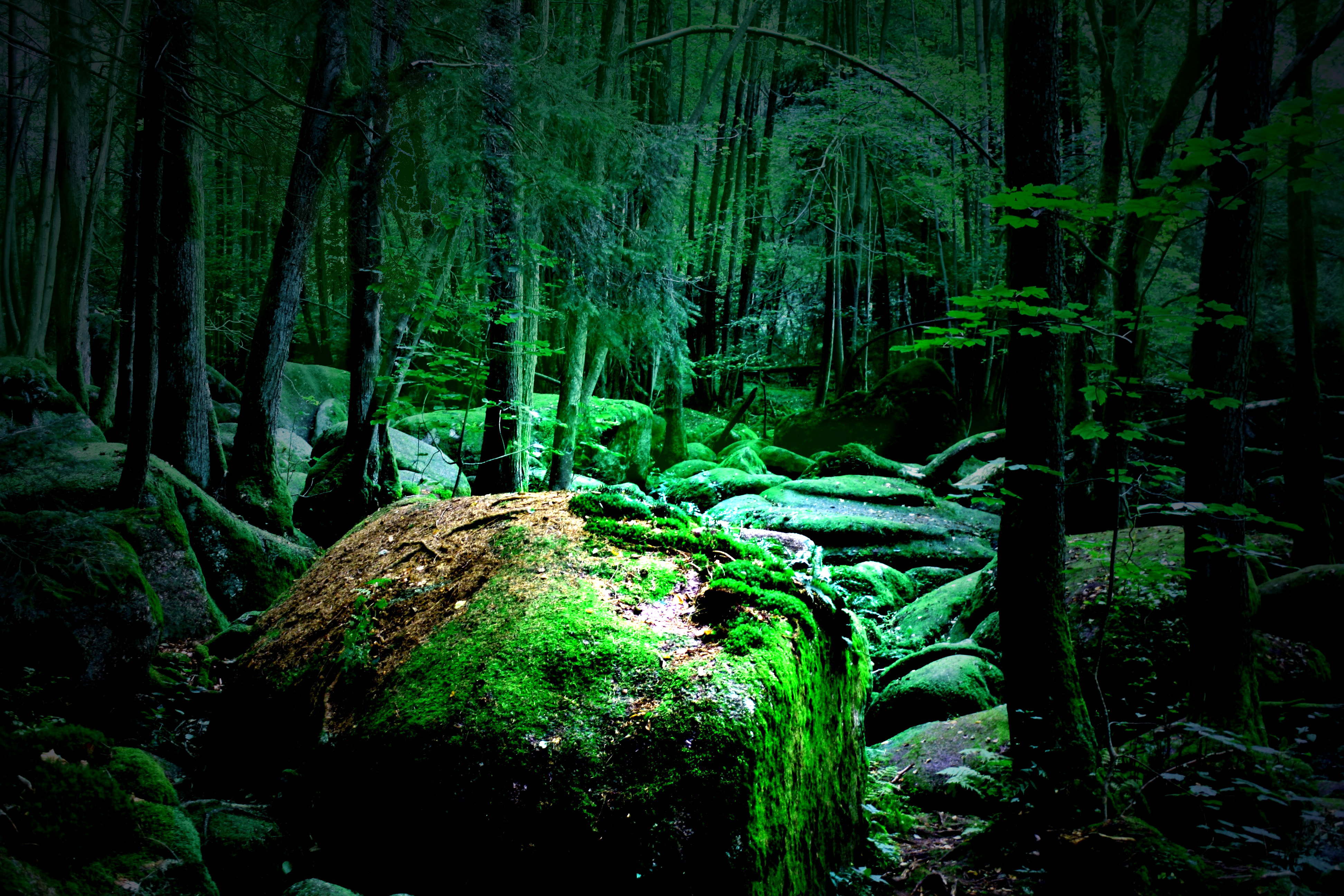 Der Höllbach in Brennberg Oberpfalz